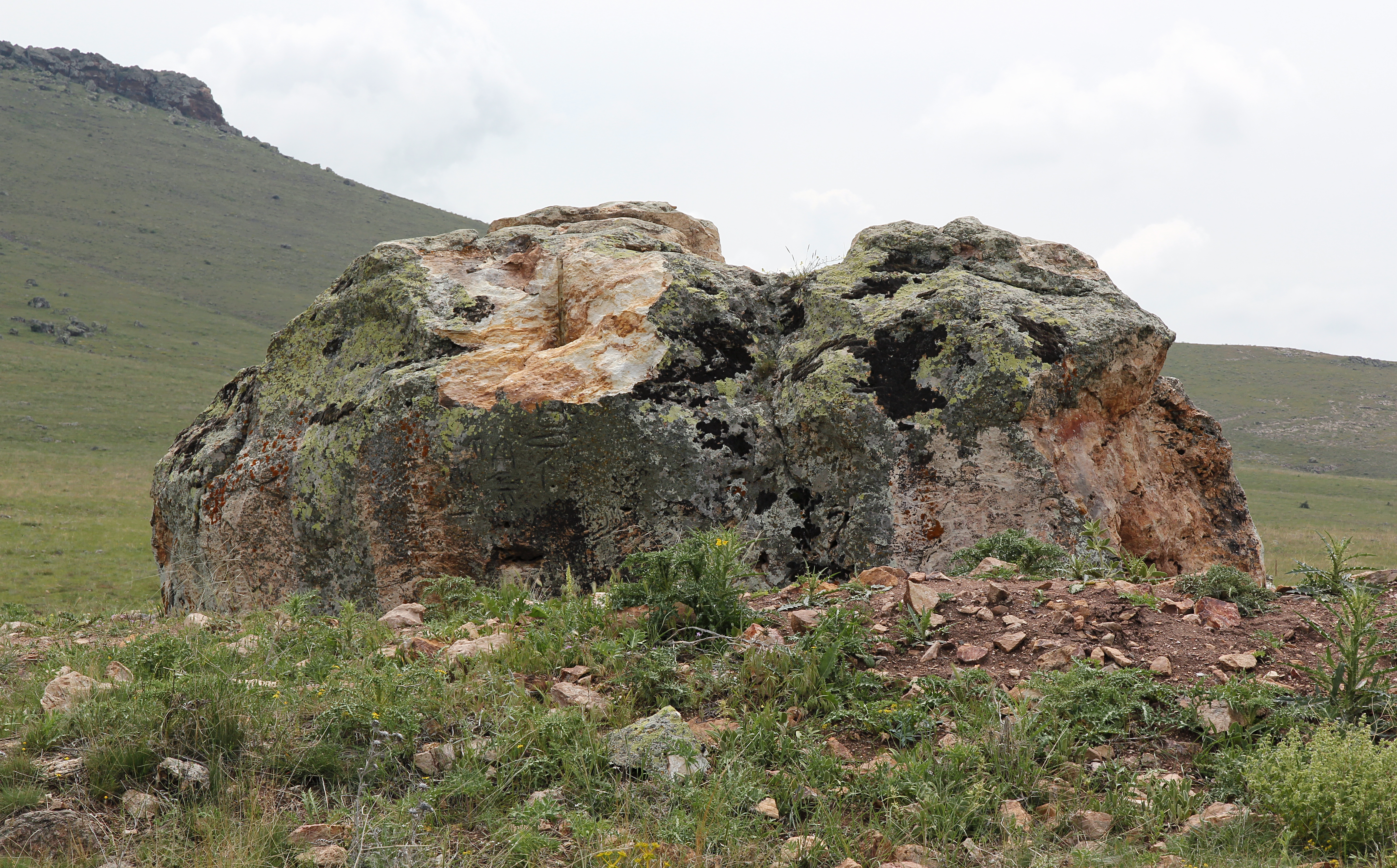 Malkaya, hethitischer Inschriftenstein bei Kırşehir, Zentraltürkei, Ansicht von Westen mit den Inschriften 5, 4, 3 (v. l. n. r.)